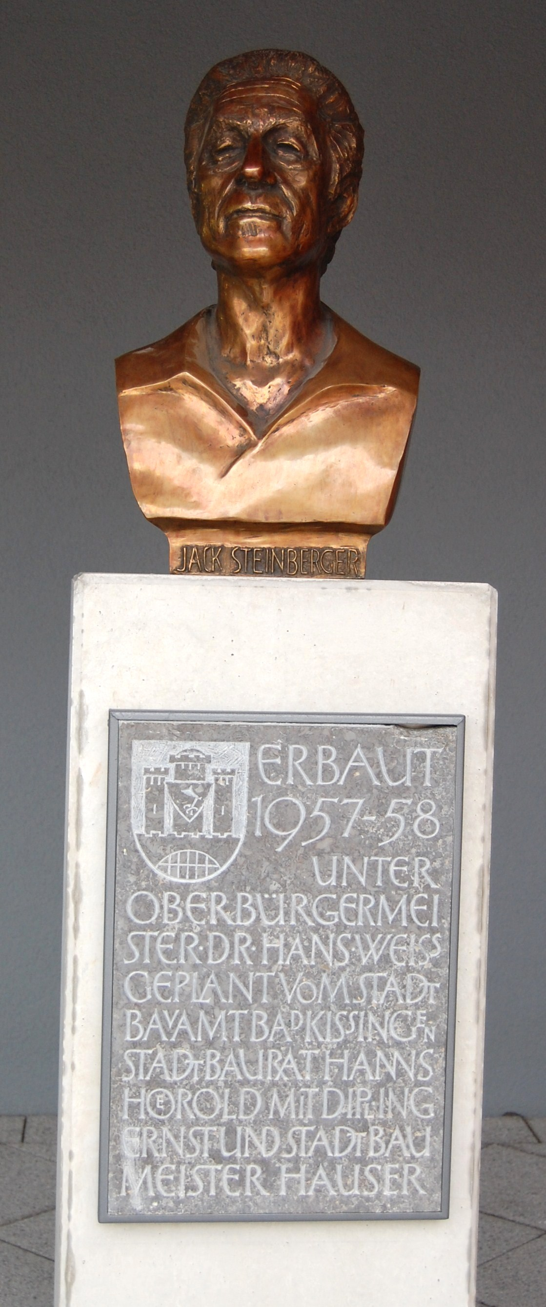 Büste des Physik-Nobelpreisträgers Jack Steinberger (* 1921); Standort: Jack-Steinberger-Gymnasium, Bad Kissingen